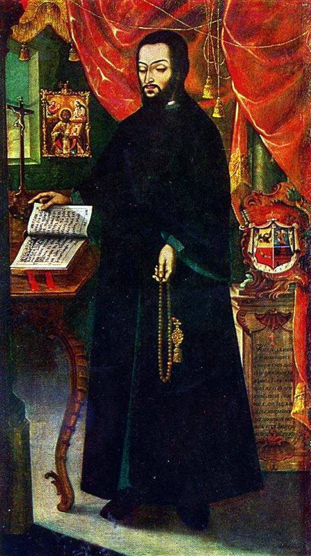 Портрет князя Дмитра Івановича Долгорукого (1738-1769). Художник монах Самуїл.